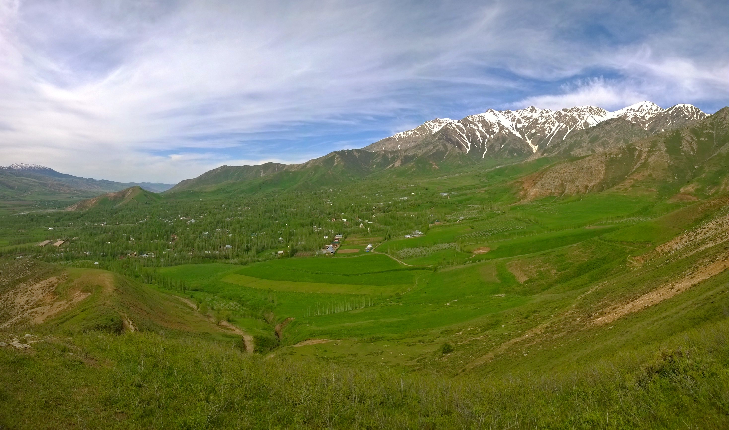 Тоҷикӣ: Манзараи умумии деҳаи Элок